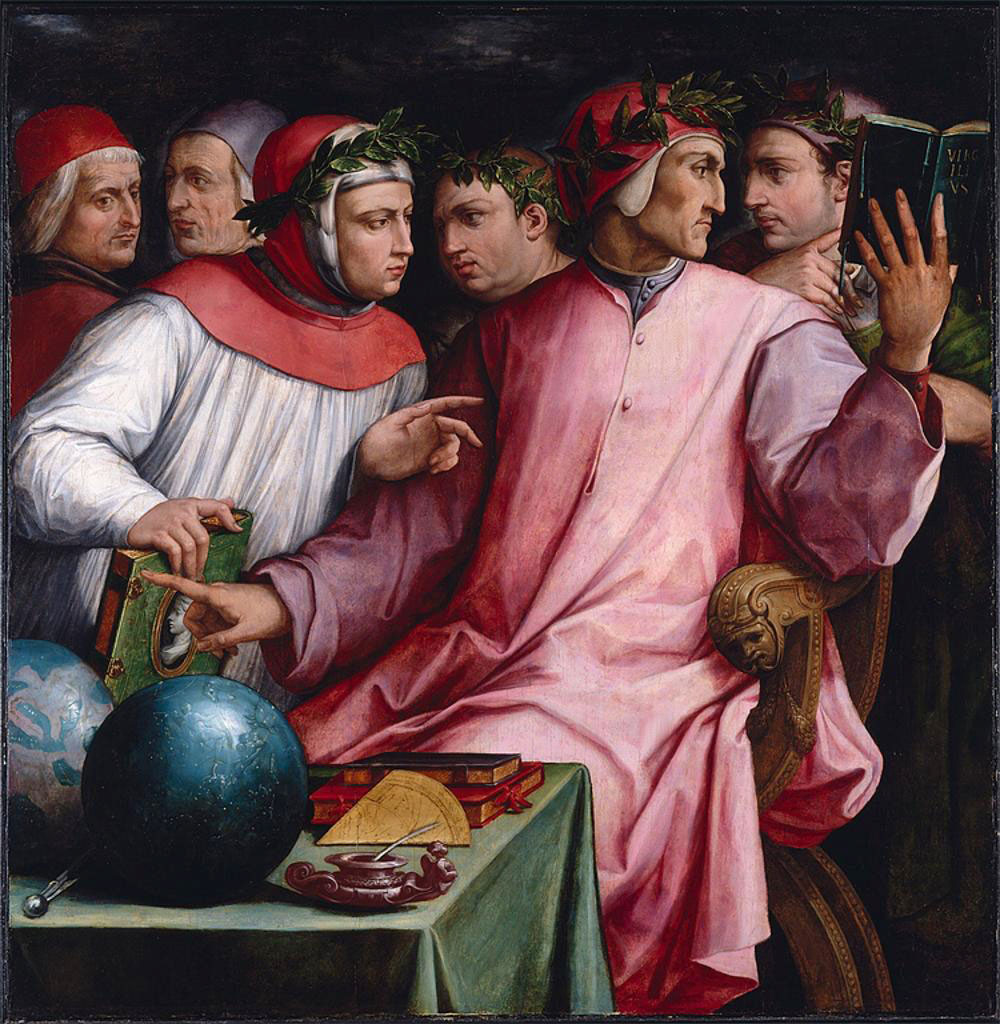 Dante, Pétrarque, Guido Cavalcanti, Boccacce, Cino da Pistoia et Guittone d'Arezzo (cf. Enciclopedia Dantesca)